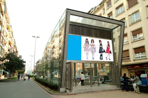 Boca de Metro Bilbao en Las Arenas/Areeta (Getxo)